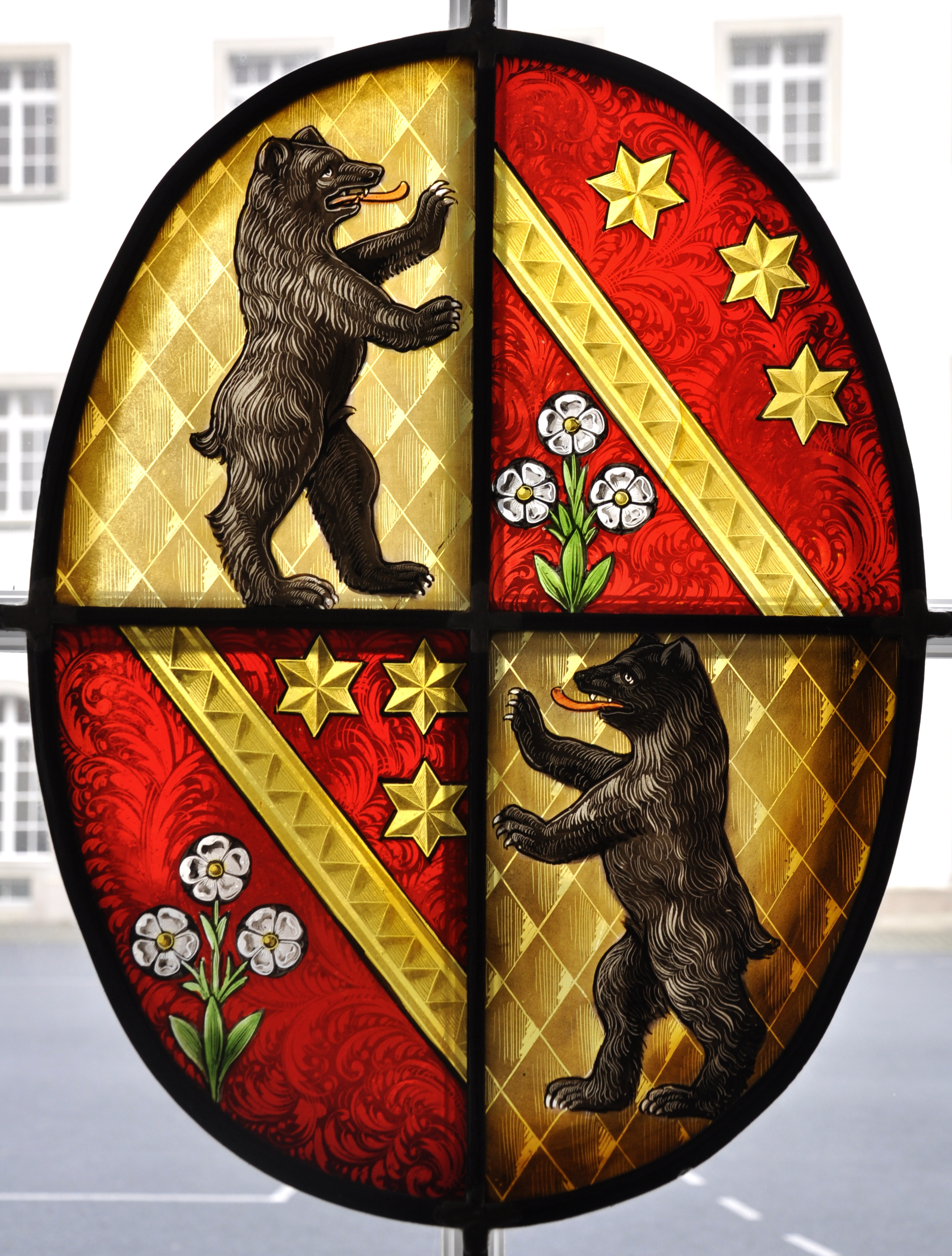 St. Gallen, Stiftskirche, Wappenscheibe im Kreuzgang, Wappen des Bischofs Carl Johann Greith